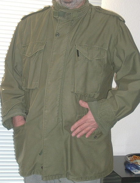 Parka, US-Style, Militärparka, olivegreen